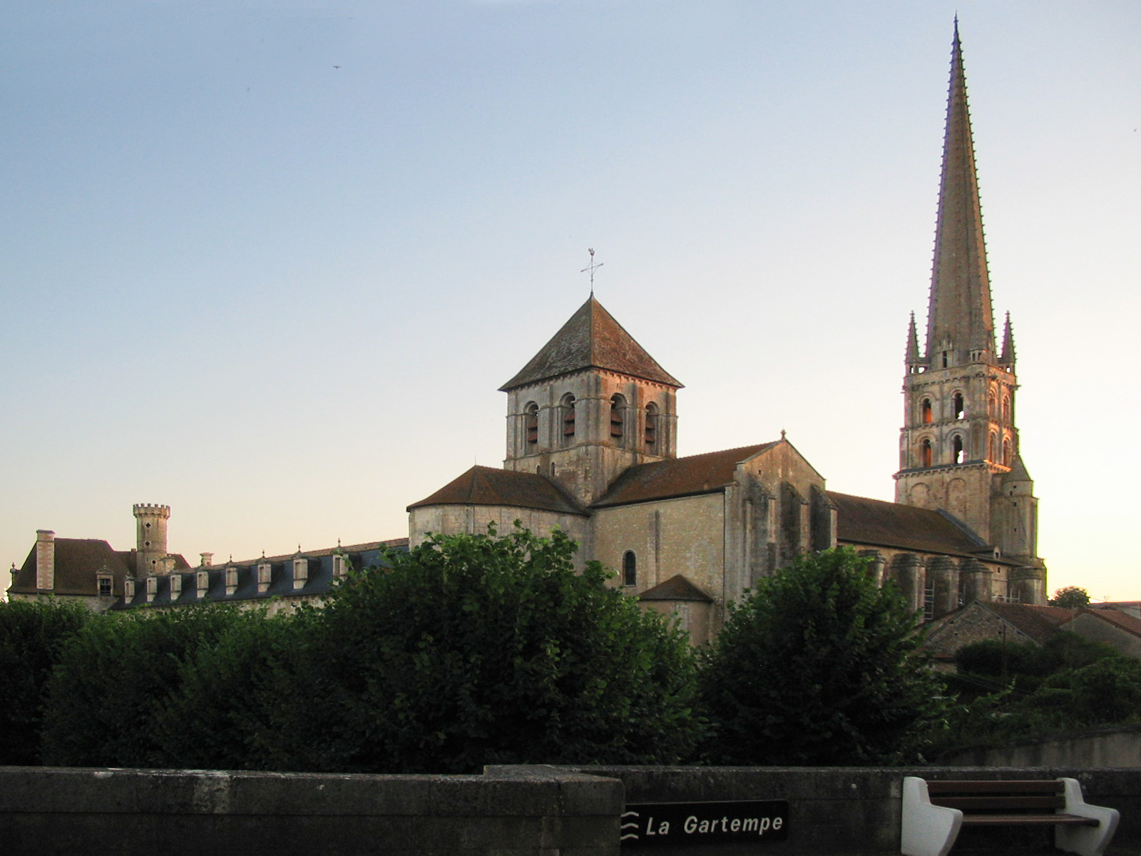 l'abbaye de Saint-Savin-sur-Gartempe au soleil couchant vue du pont sur la Gartempe.